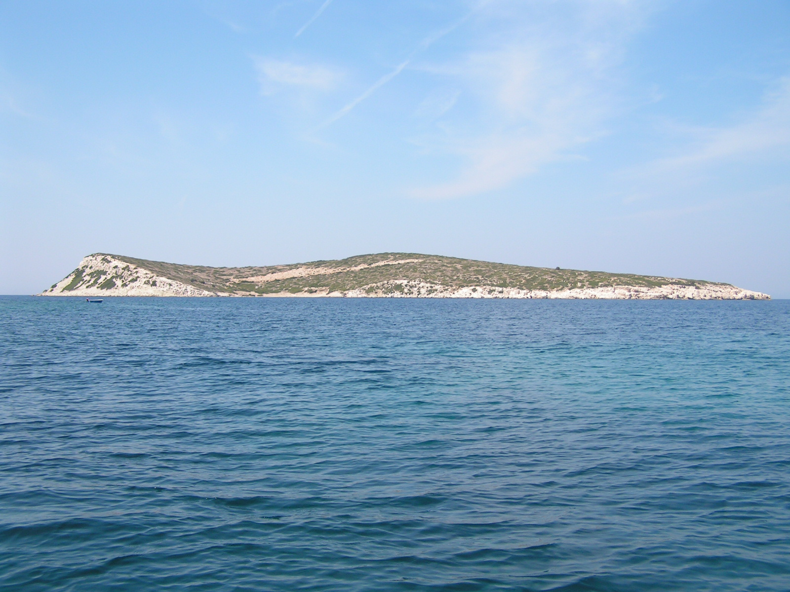 Büyük Ada - Karaburun, Izmir / Turkey